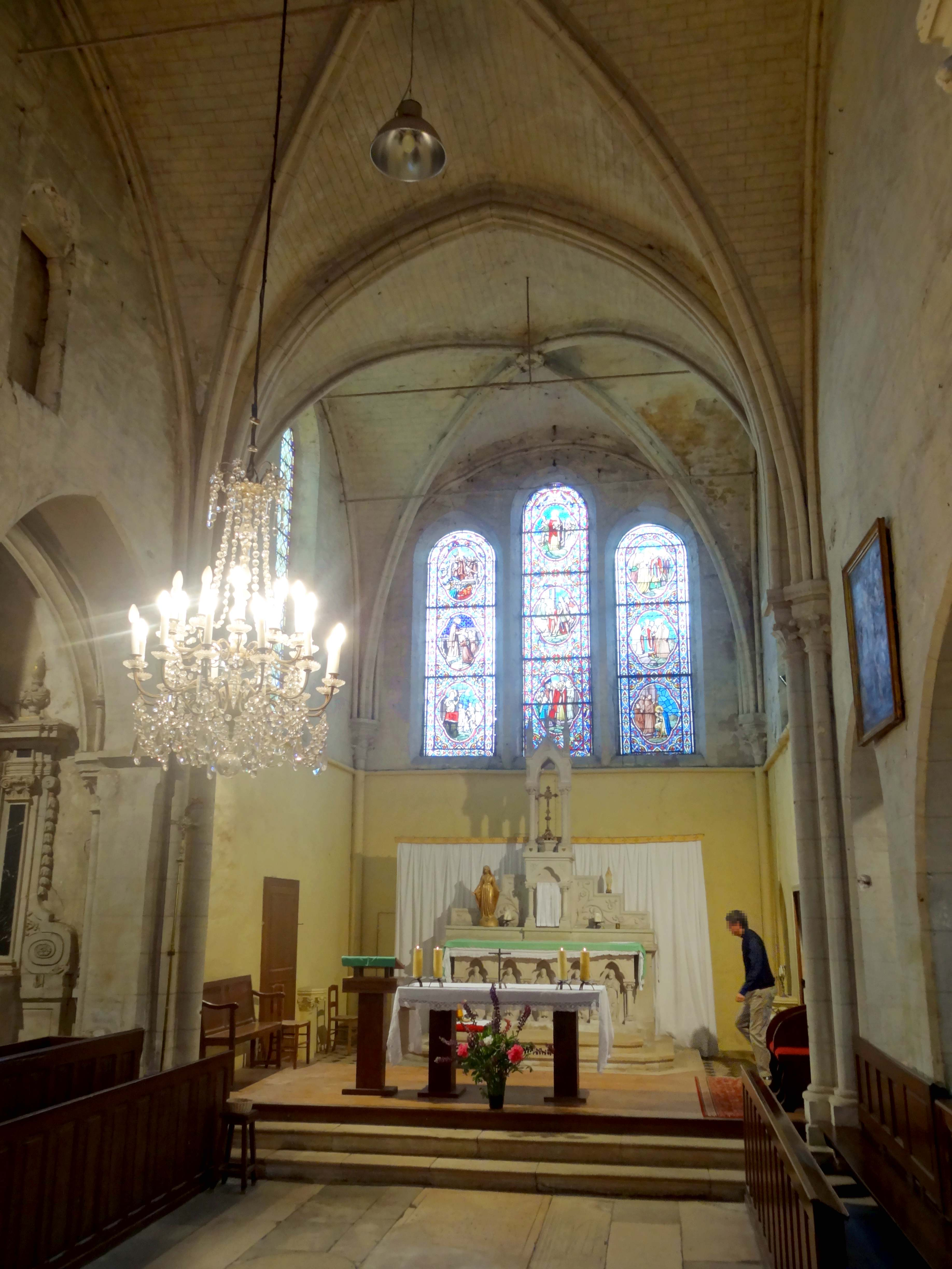 Intérieur de l'église - voir titre.